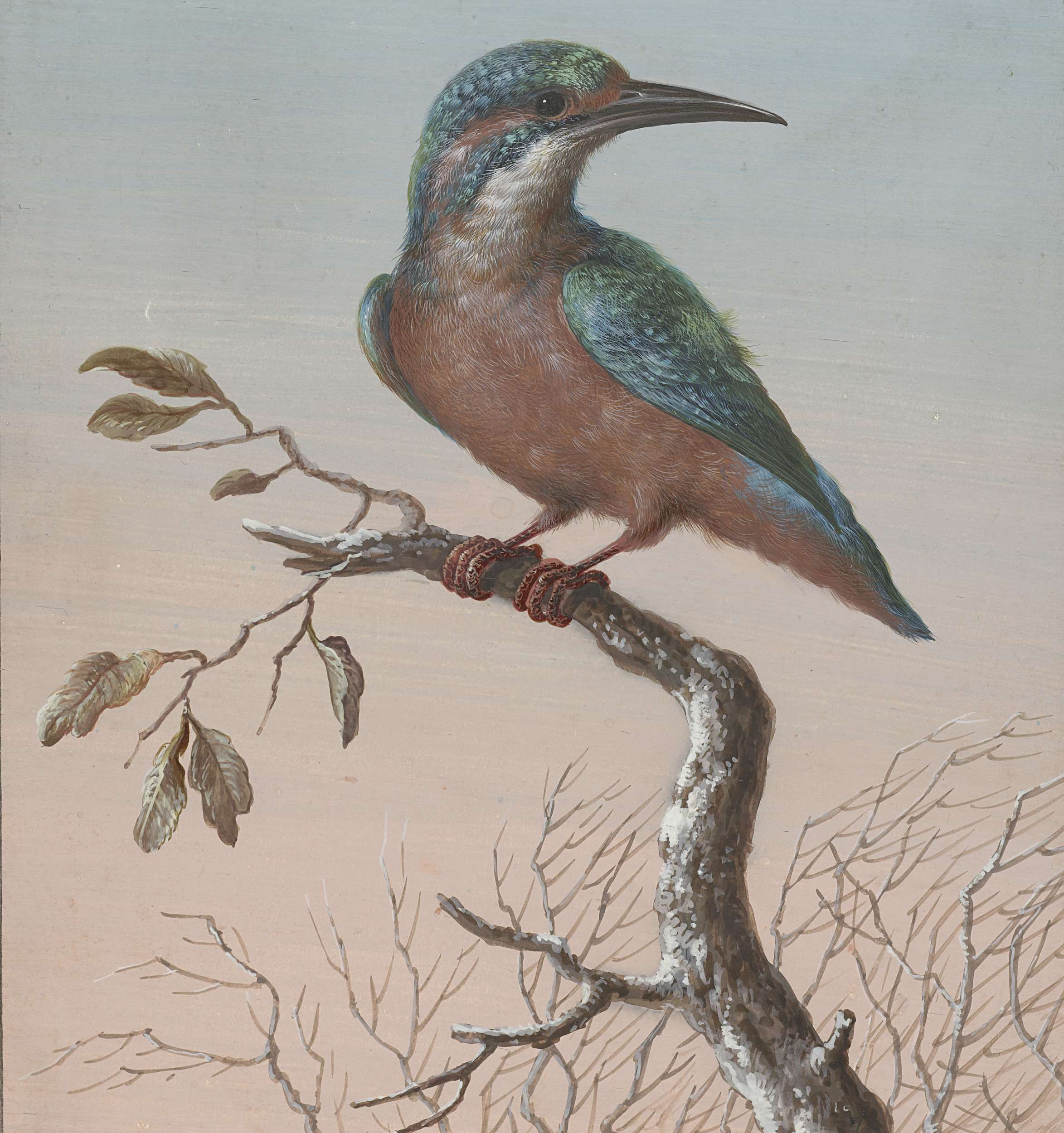 drawing